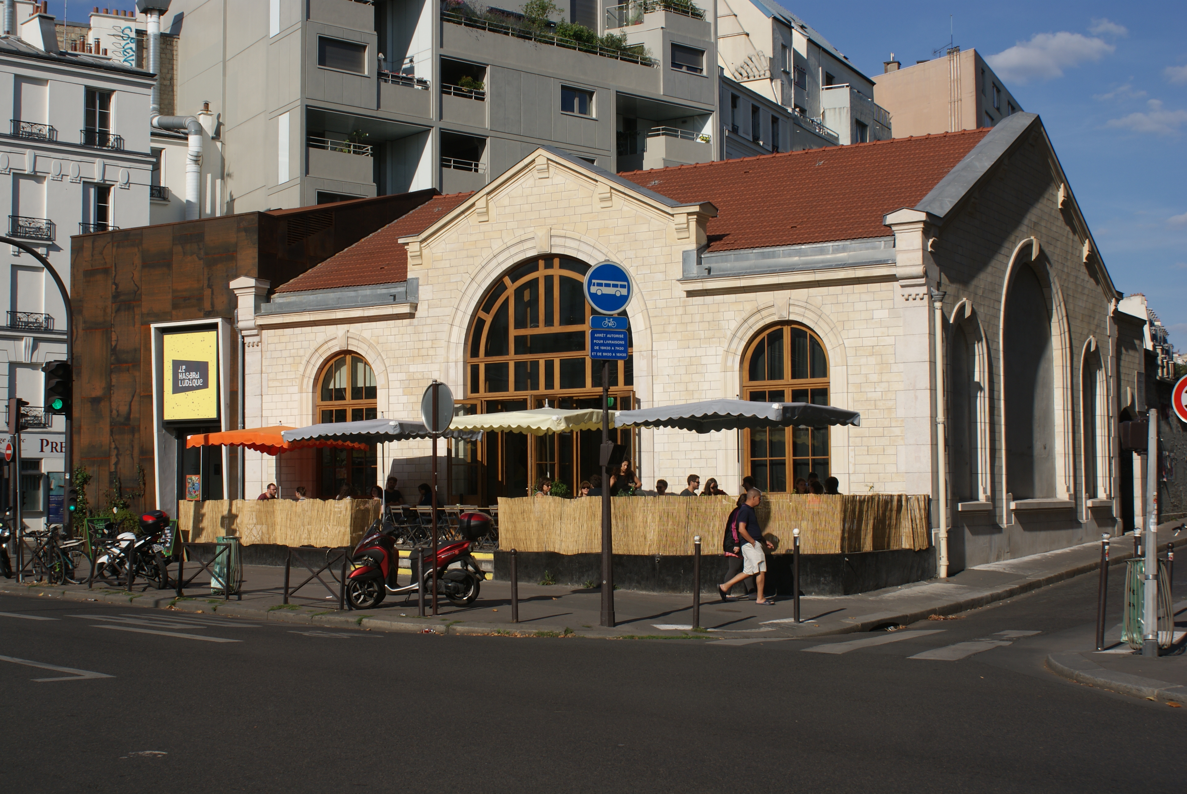 La gare de l'avenue de Saint-Ouen en août 2017, après sa rénovation.